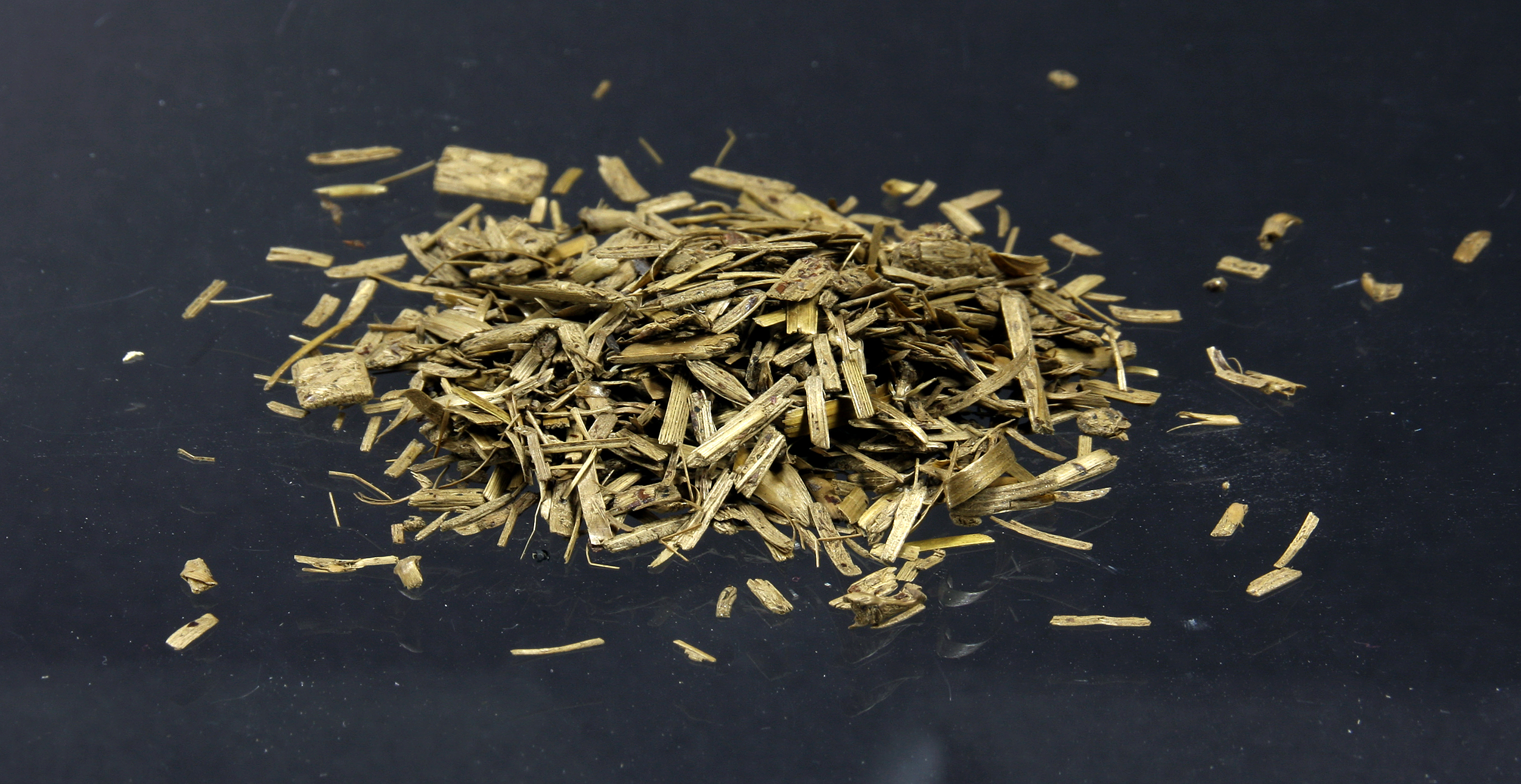 Gärreste